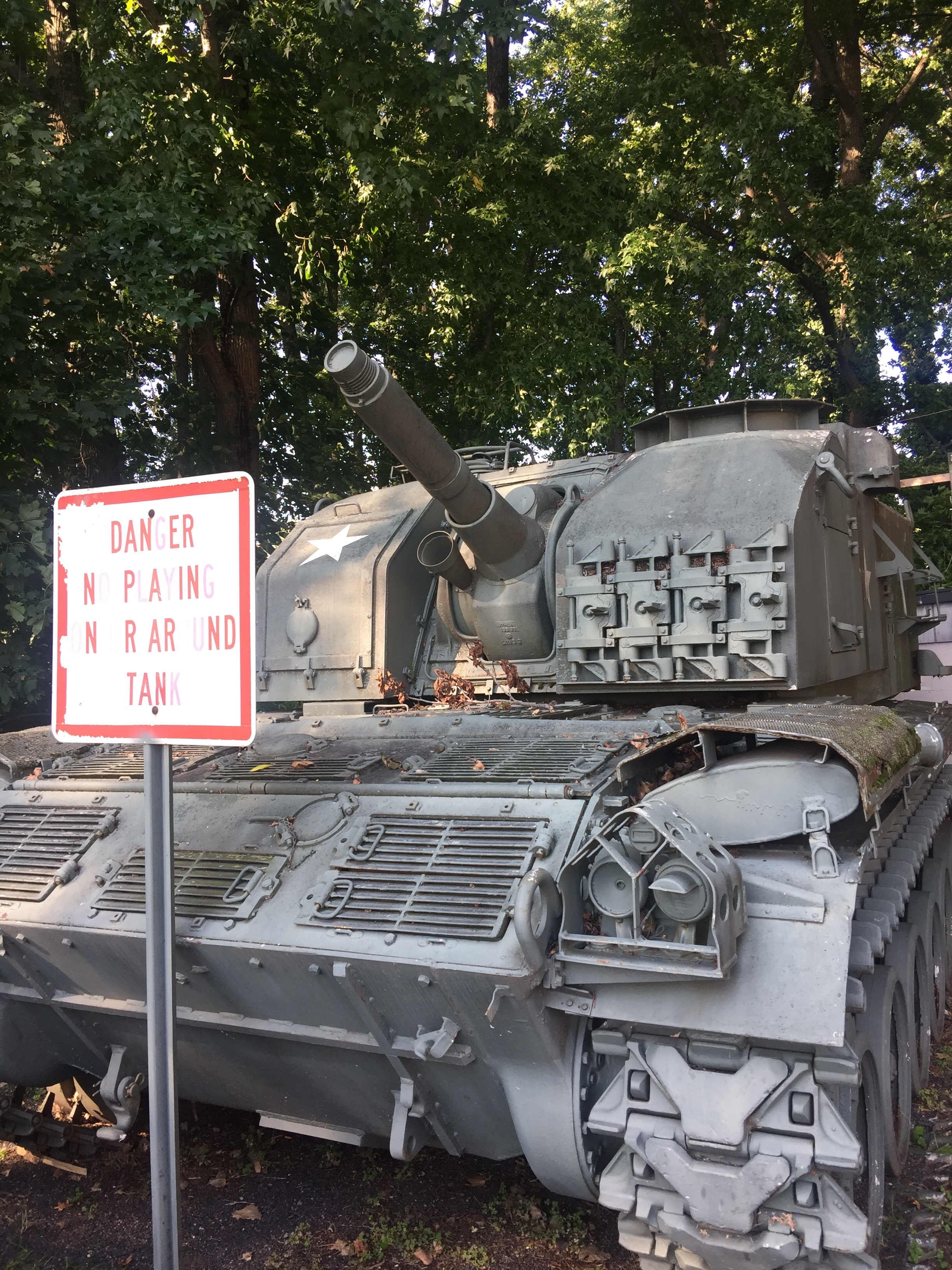 Памятник на автомобильной стоянке возле Дома Ленионеров, Инглвуд, Нью-Джерси, США